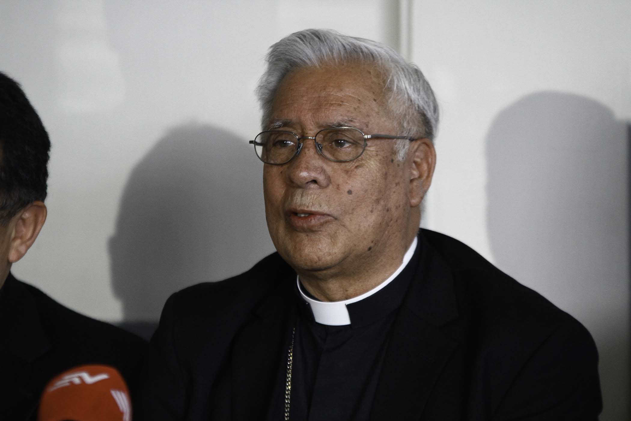 Quito, 01 de julio (Andes).- Autoridades eclesiásticas de la Conferencia Episcopal ofrecieron una rueda de prensa en las instalaciones de Quito Turismo para dar a conocer los detalles de la visita del papa Francisco a Ecuador. En la gráfica monseñor Fausto Travez, presidente de la Conferencia Episcopal Ecuatoriana. ANDES/Micaela Ayala V.